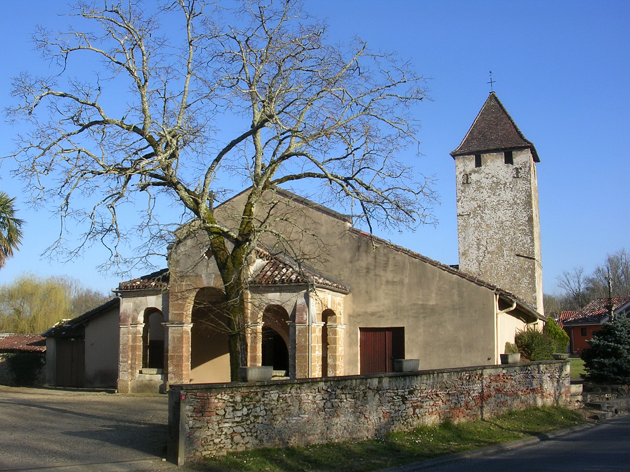 Saint-Cricq-Villeneuve, église Saint-Cyr